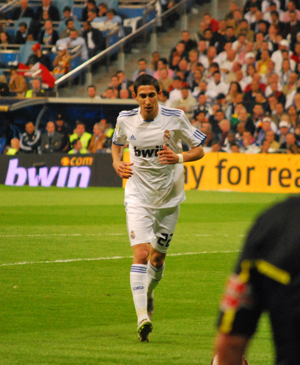 Di María al Corner